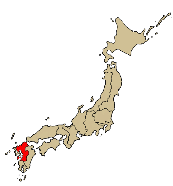 Mappa dell'arcidiocesi cattolica di Fukuoka, in Giappone. Lavoro personale.